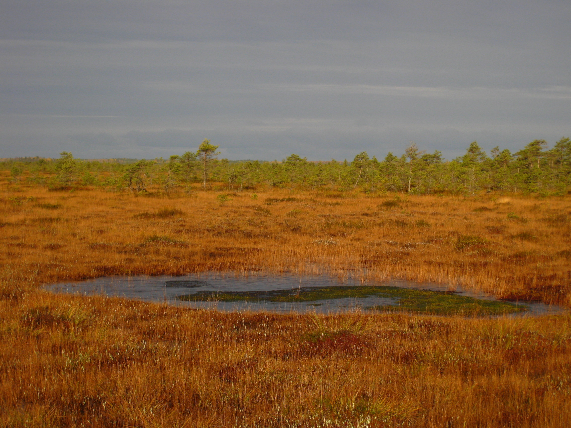 Muraka raba idaosas